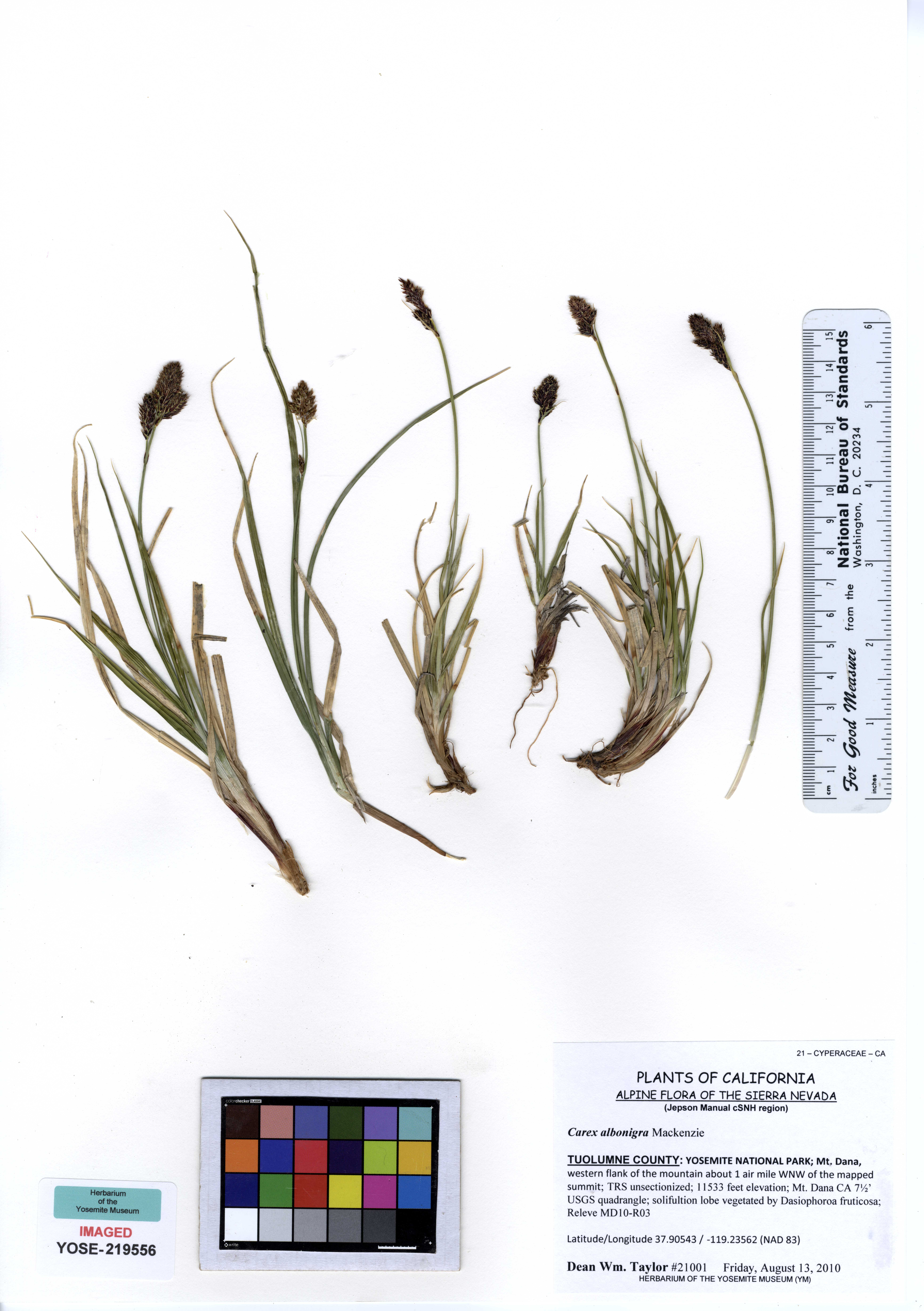 YOSE219556 Carex albonigra